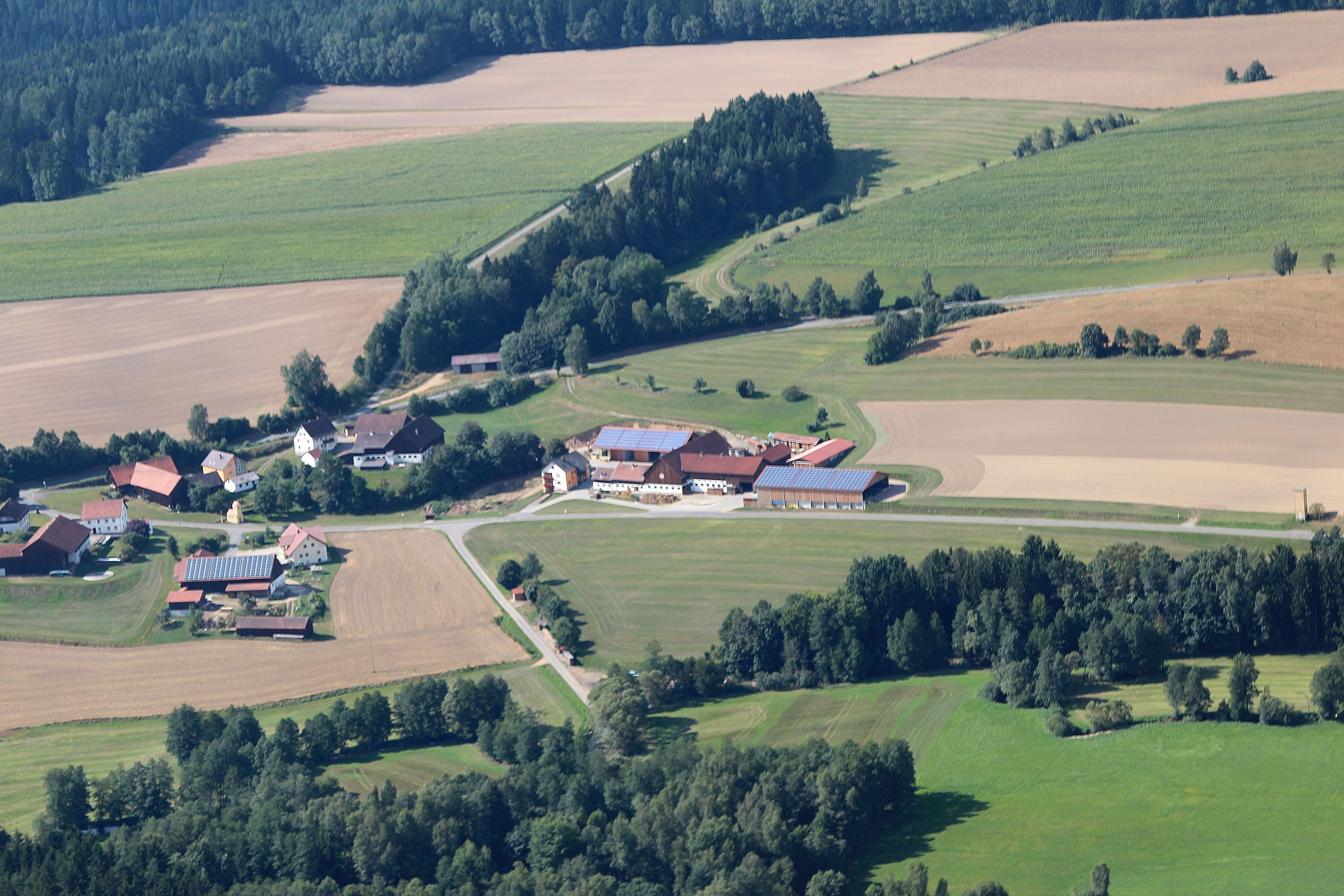 Höflarn, Gemeinde Niedermurach, Landkreis Schwandorf, Oberpfalz, Bayern